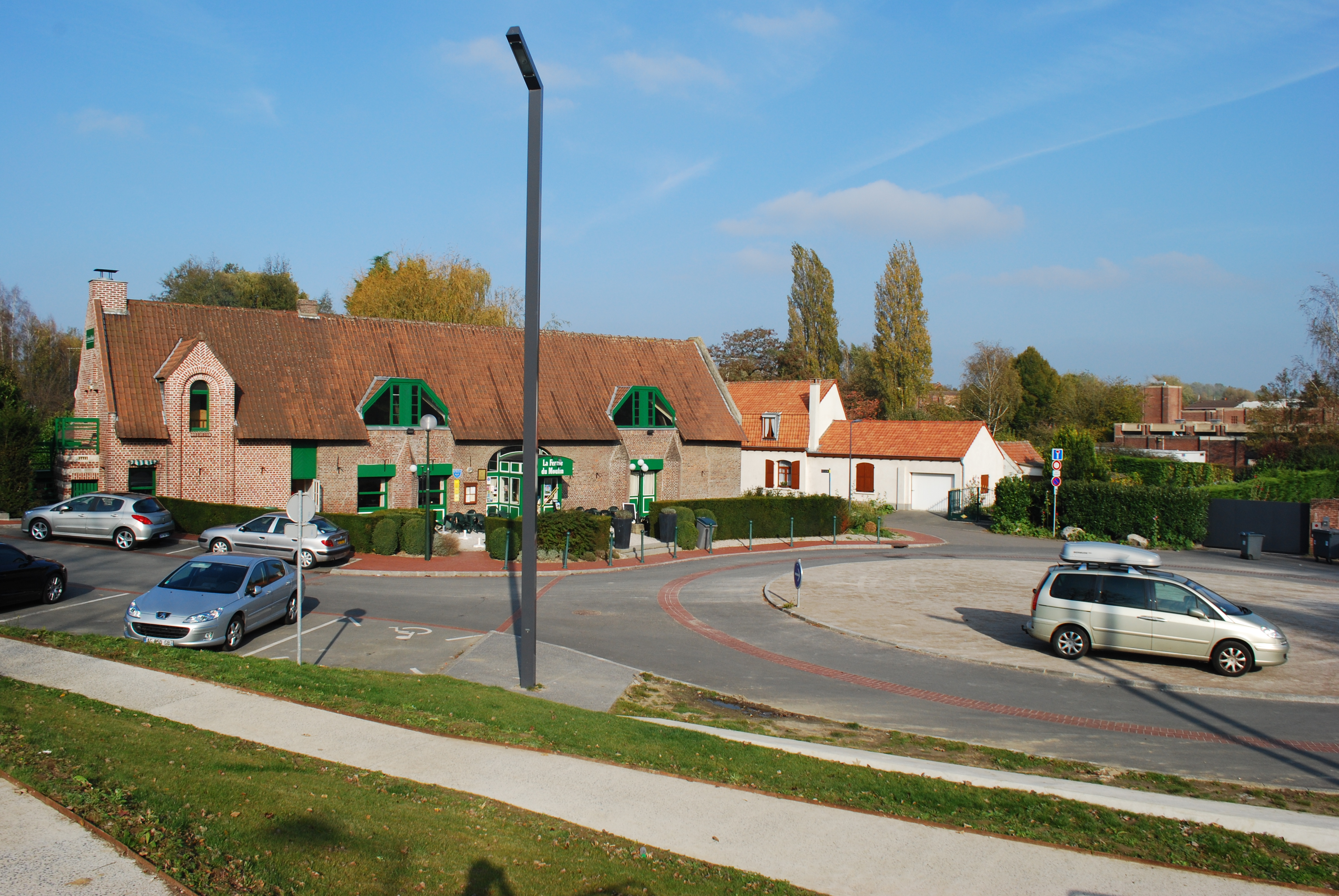 Vue des abords du LaM (Musée d'Art moderne, d'Art contemporain et d'Art brut, Lille métropole).